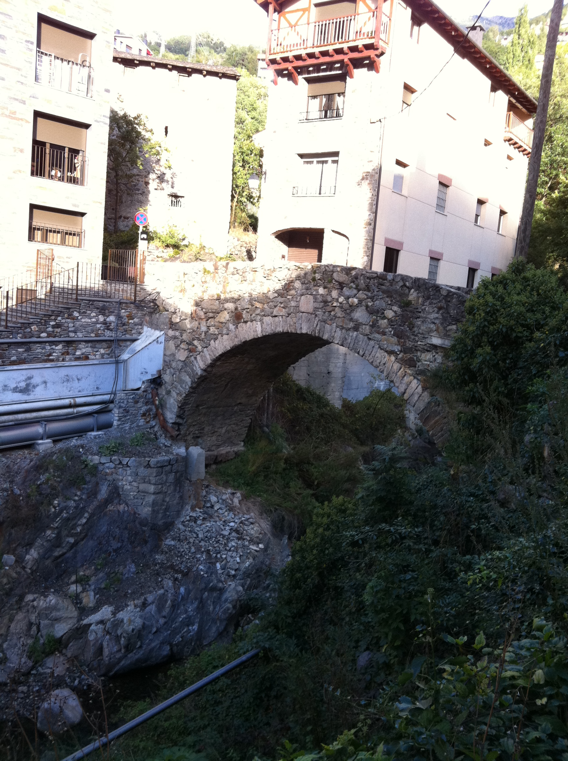 Pont de la Tosca